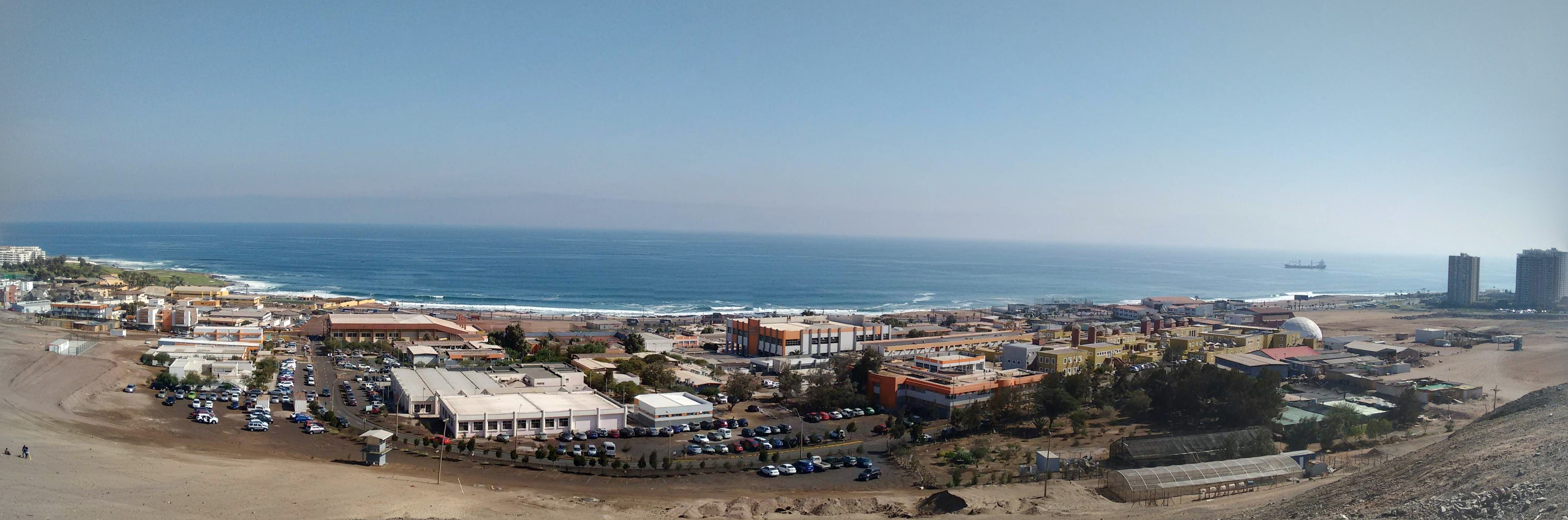 Panorámica del Campus Coloso de la Universidad de Antofagasta.